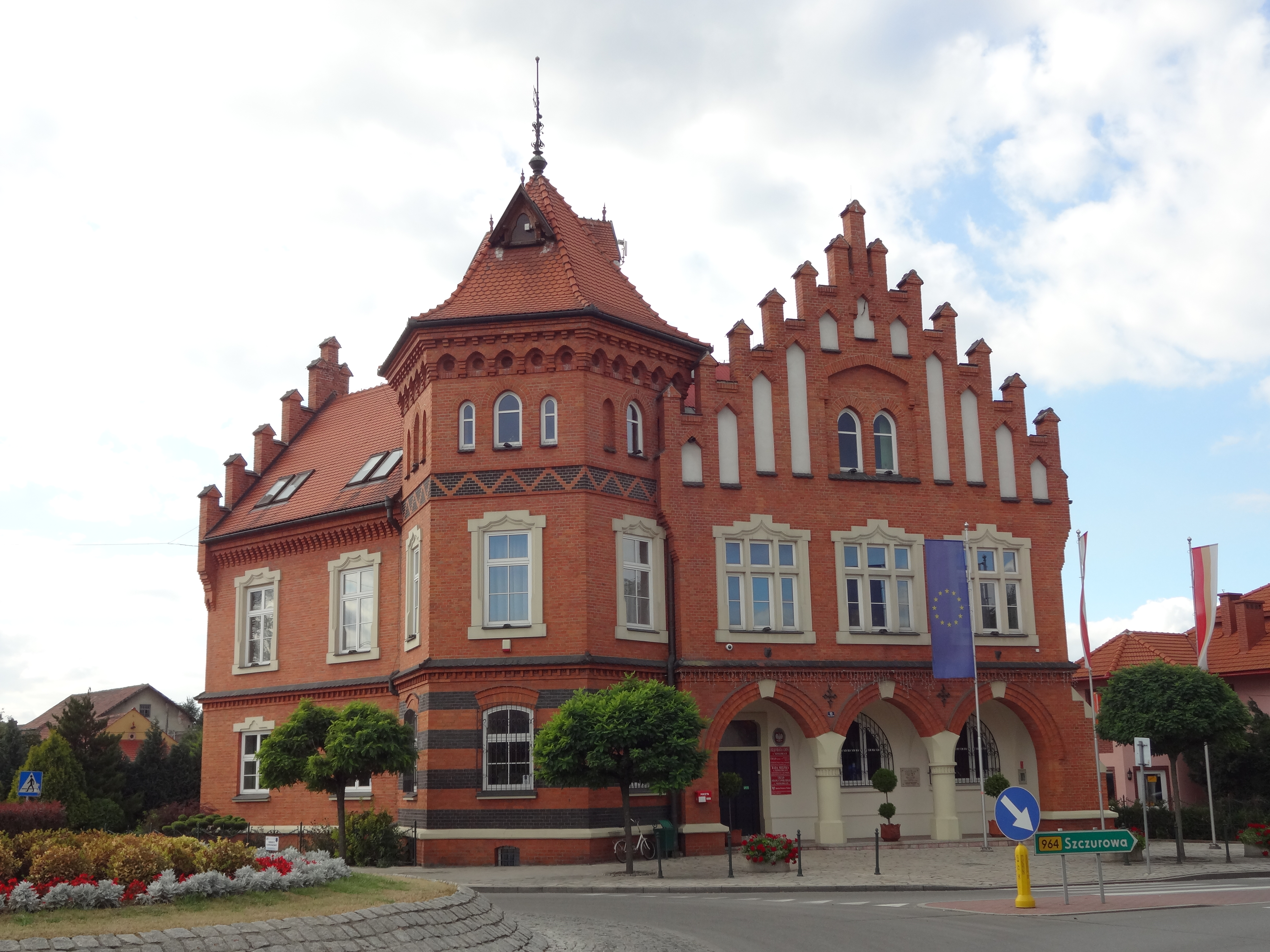 ratusz Niepołomice, Pl. Zwycięstwa 13, Niepołomice